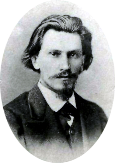 Александр Павлович Эльтеков (1846 — 1894) — русский учëный, химик-органик